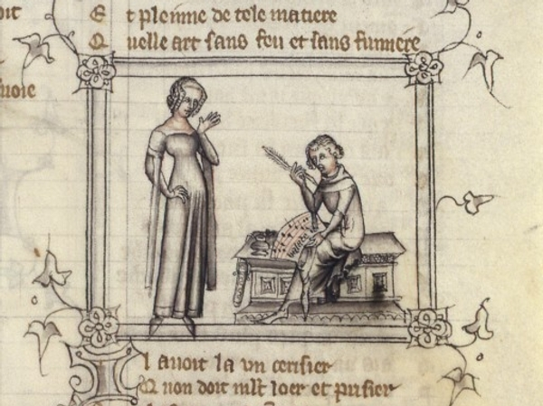 Machaut et le messager de sa dame